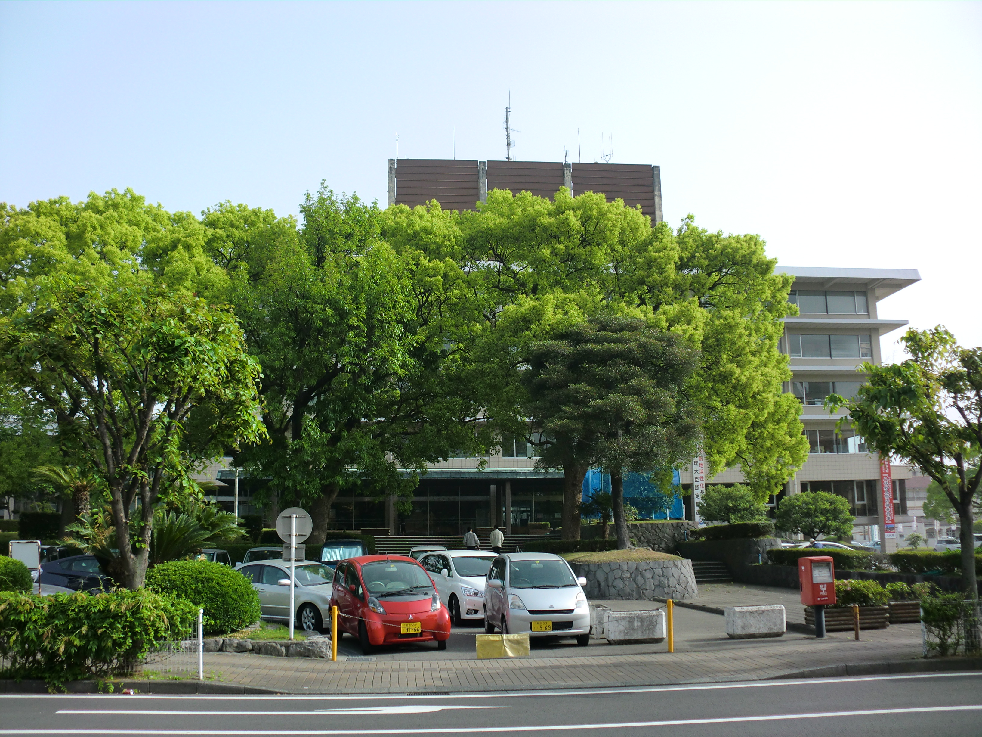 熊本県八代市にある八代（やつしろ）市役所